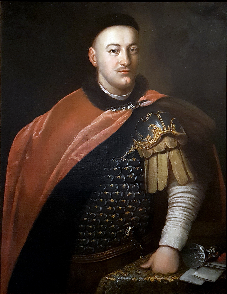 Беларуская (тарашкевіца): Партрэт Караля Станіслава Радзівіла (Karal Stanisłaŭ Radzivił)